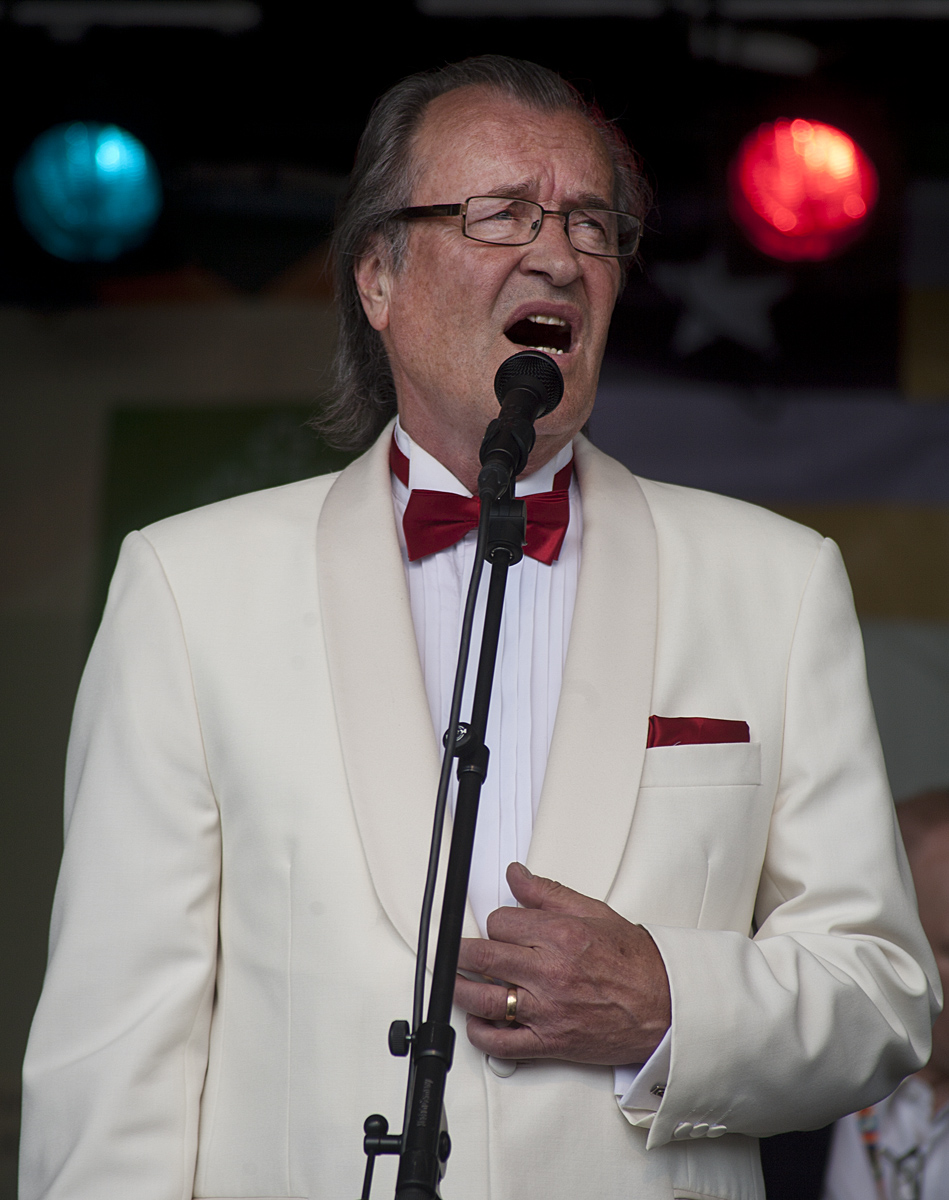 Laulaja ja muusikko Martti Metsäketo esiintymässä lauluyhtye Four Catsin kanssa Helsingin Kaisaniemessä Maailma kylässä -festivaalilla 25.5.2014. Kuva: Harri Ahola